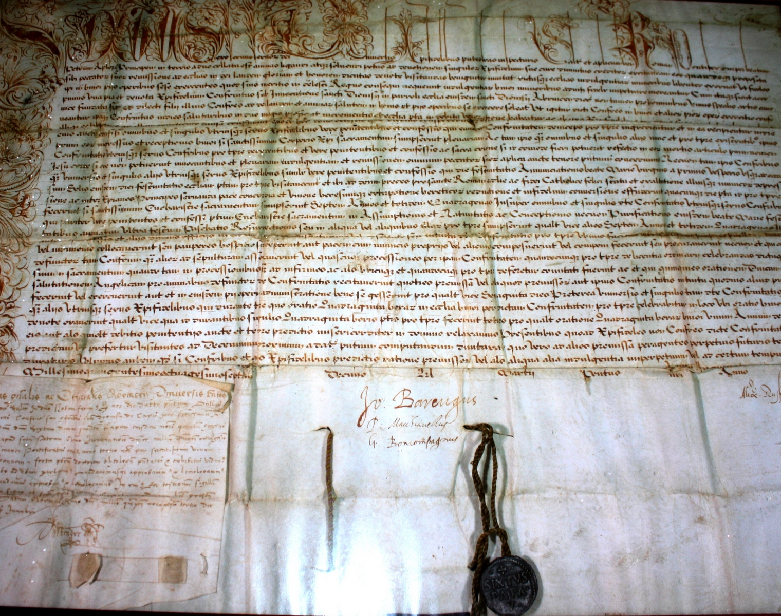 Numérisation de la bulle de Sixte V (conservée au archives départementales de la Manche).